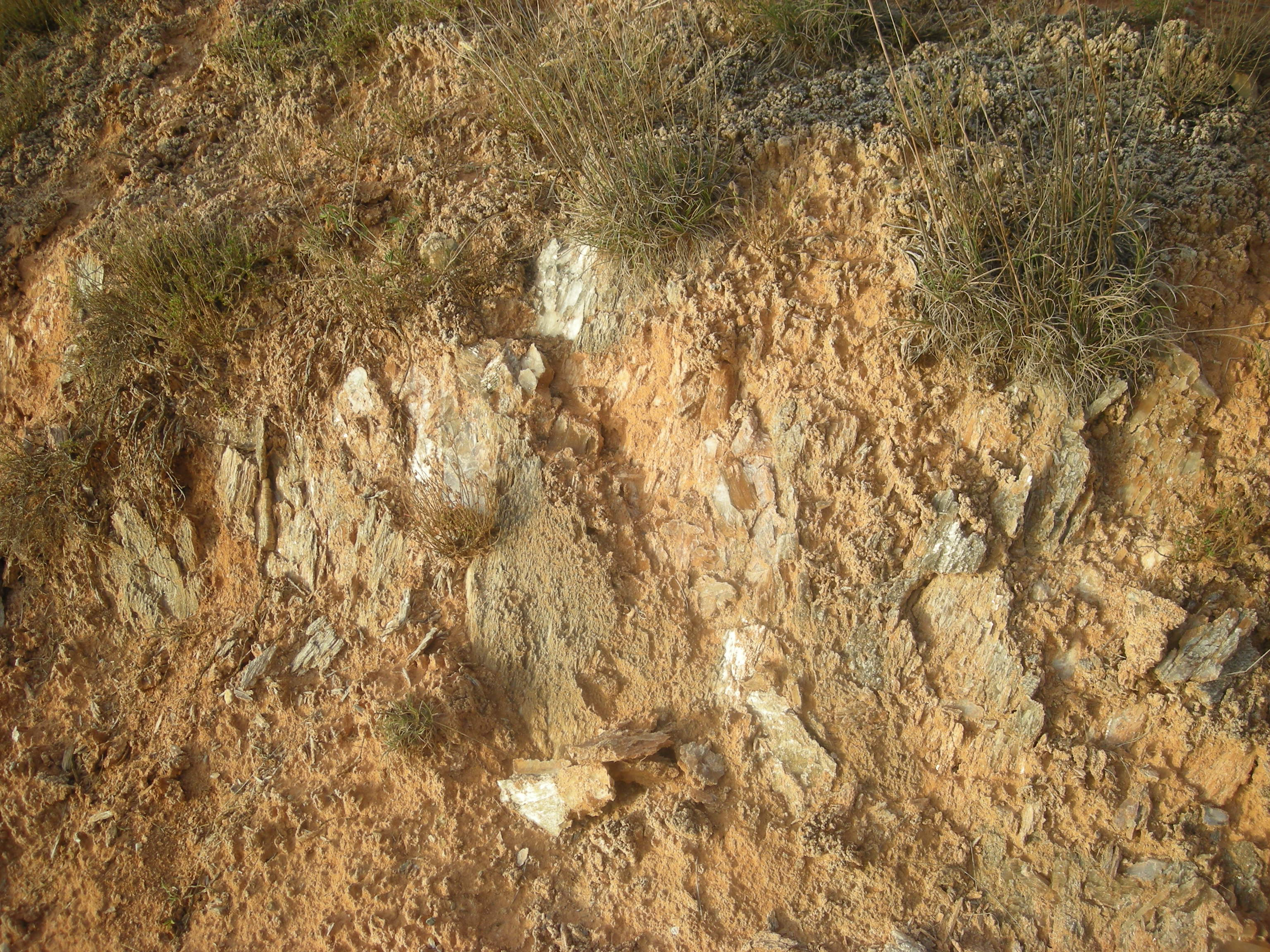 Filón de piedra de yeso. Cuenca, España.